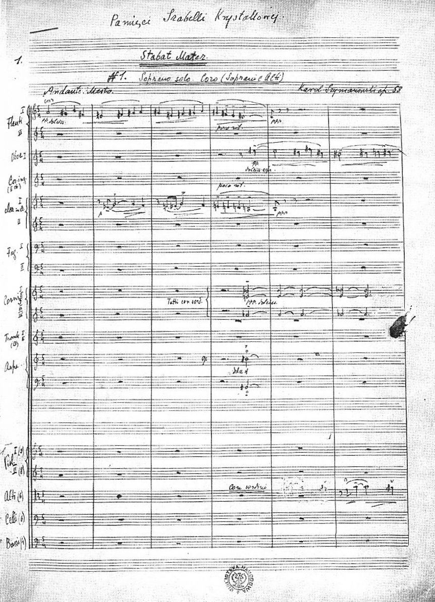 Autograf partytury Stabat Mater Karola Szymanowskiego z dedykacją autora dla Izabelli Krystallowej